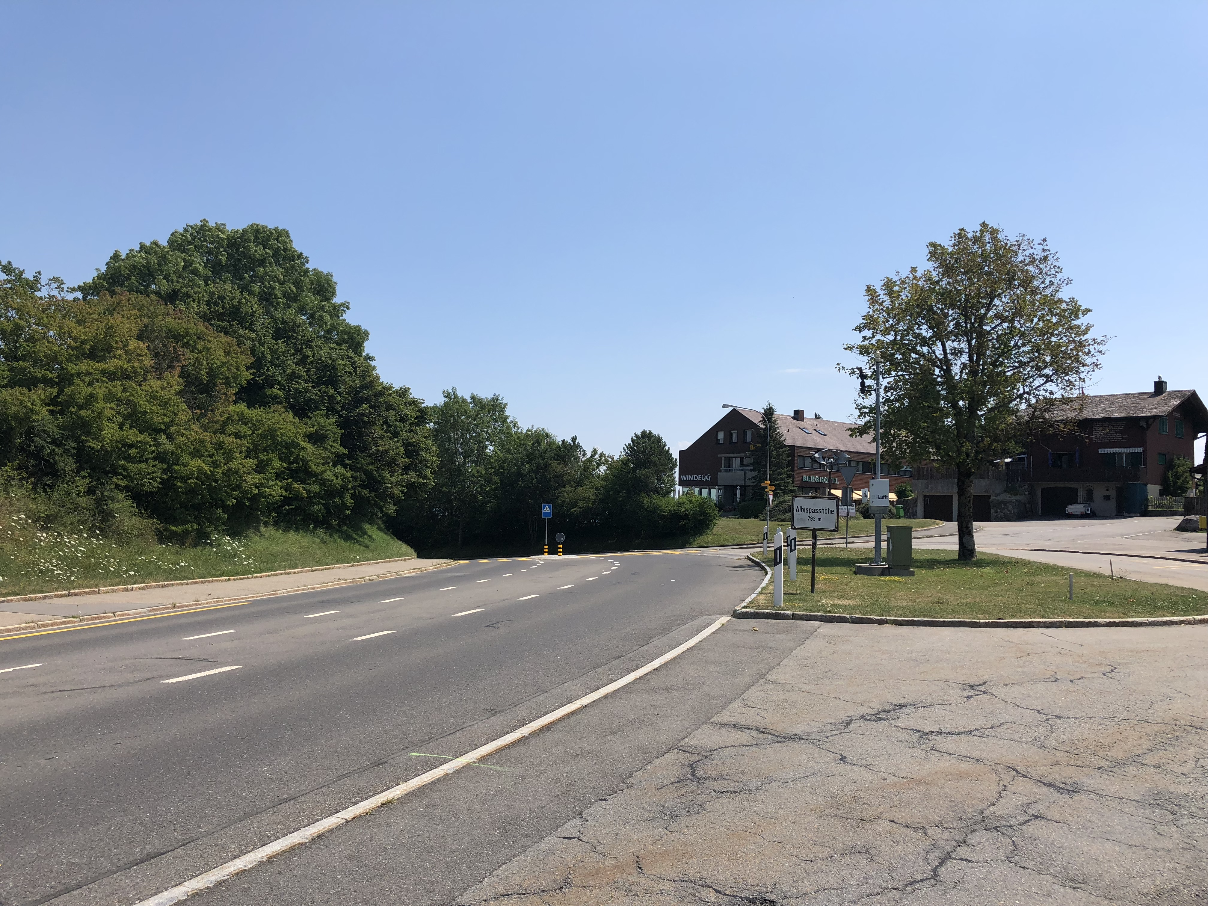 de: Albispass nach Osten